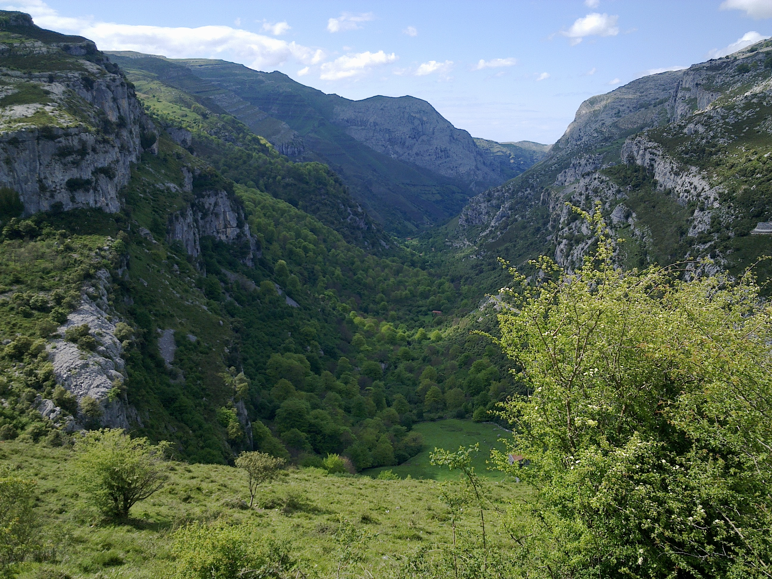 Valle alto del río Asón desde el mirador de Asón This is a photography of a Site of Community Importance in Spain with the ID: ES1300011. Natura2000 entry, EEA entry